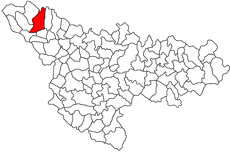 Sannicolau Mare, judetul Timis Licensing Categorie:Hărţi ale judeţului Timiş